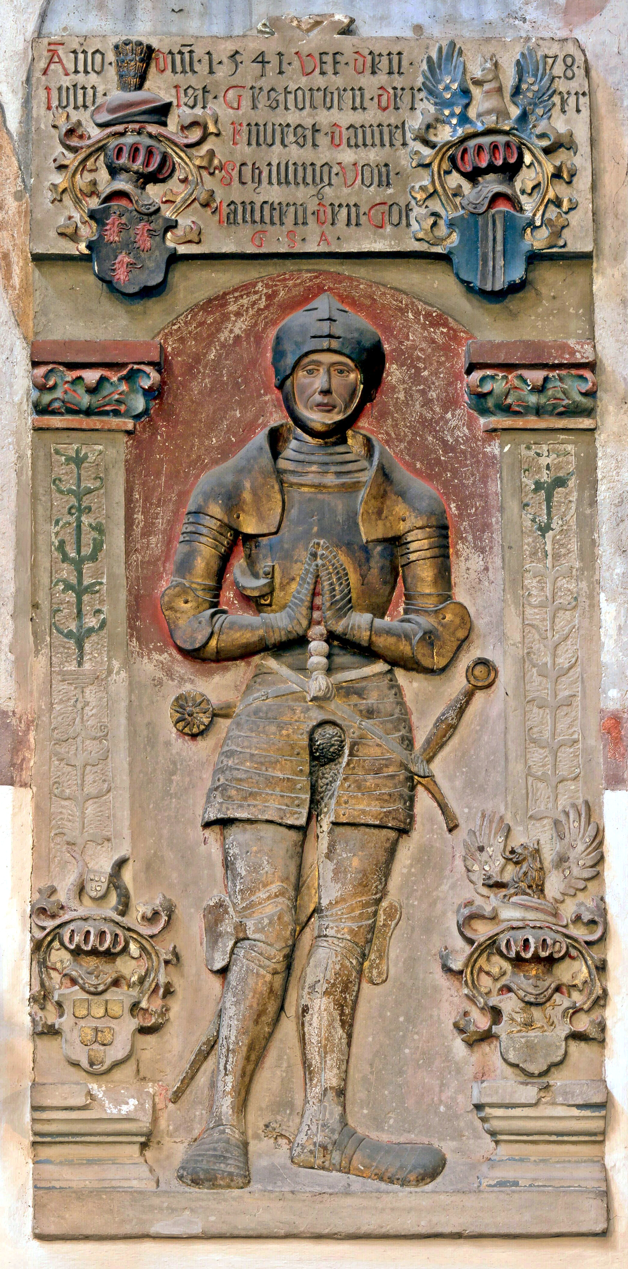 Grabmal des Daniel Schilling von Lahnstein, Bürgermeister von Andernach, gestorben 1541. Material: Tuffstein. Ritter Daniel Schilling von Lahnstein war Bürgermeister von Andernach. Er errang im Kampf gegen den Landesherrn, den Erzbischof von Köln, für kurze Zeit (1537-1540) die Reichsunmittelbarkeit der Stadt.